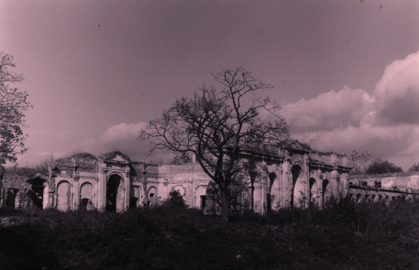 Вид на дитинець заславського палацу.